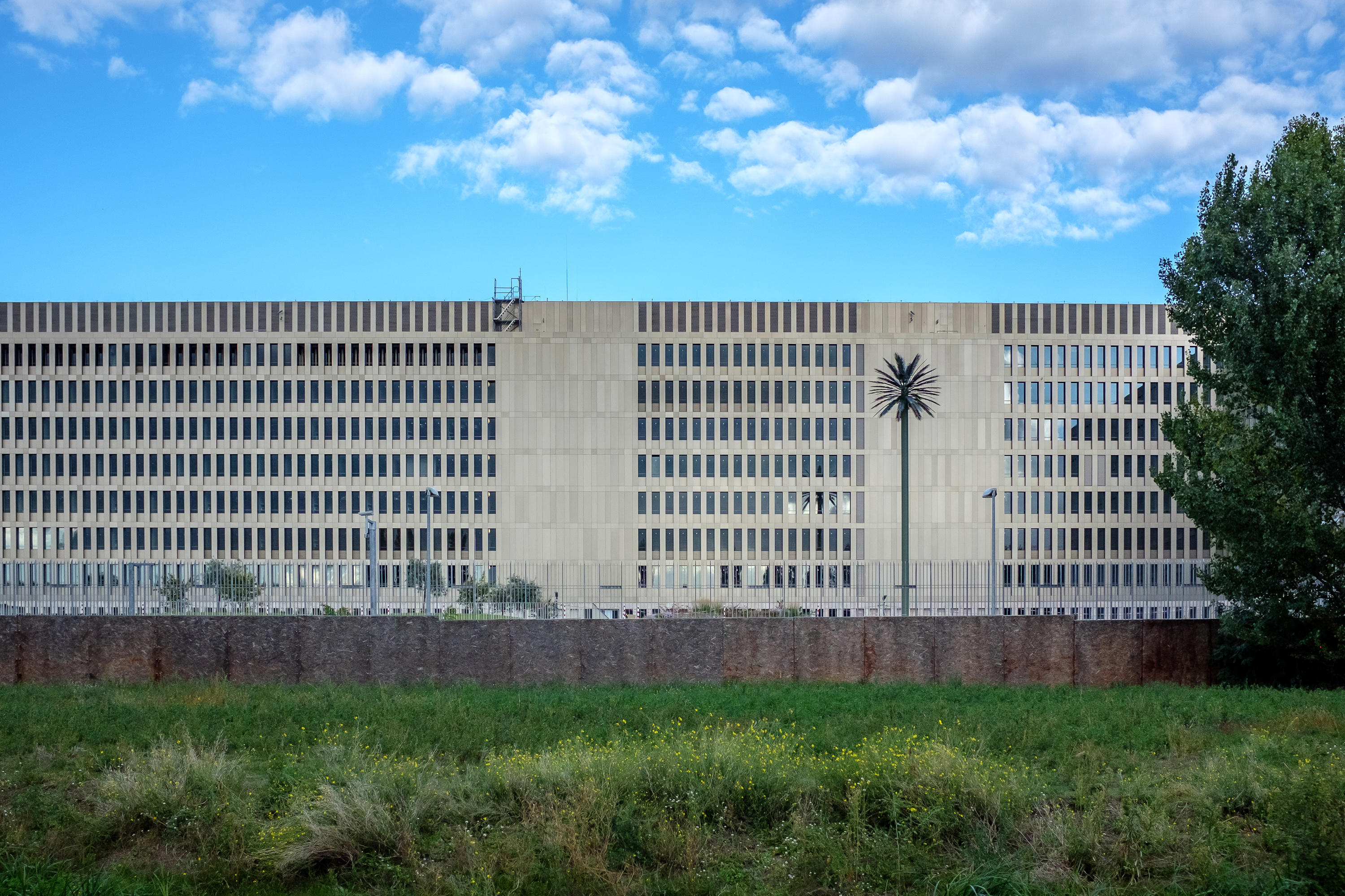 Dieses Bild zeigt die zukünftige Zentrale des Bundesnachrichtendienst (BND) in Berlin